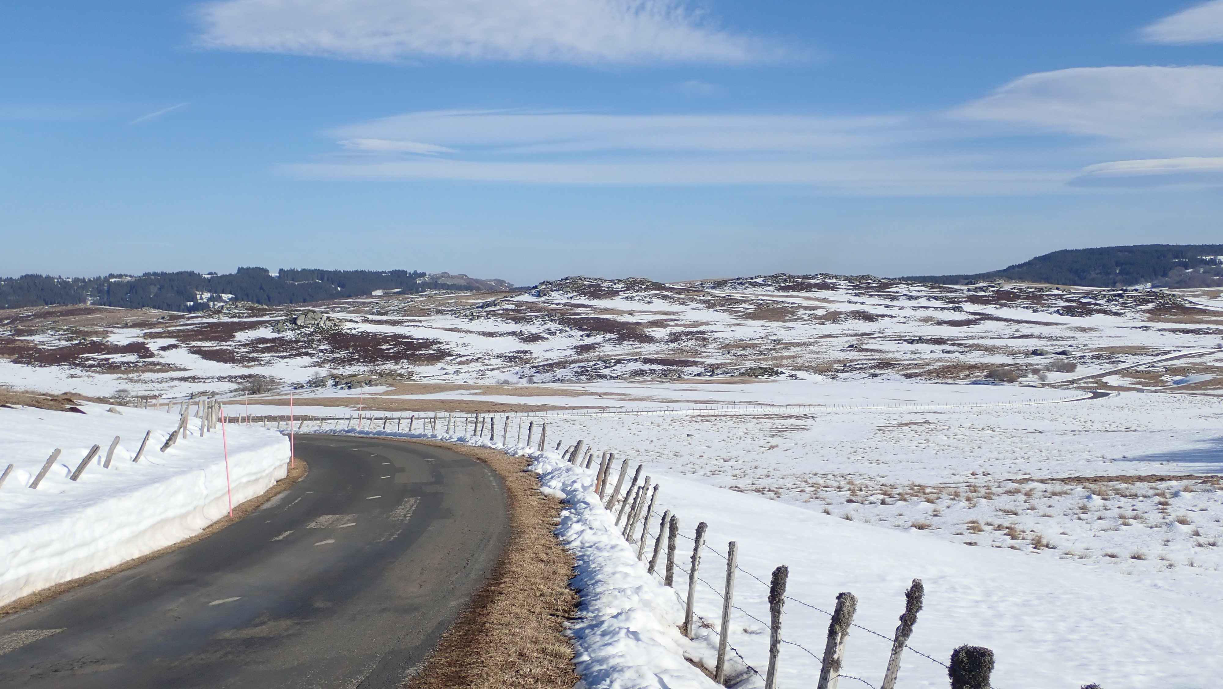 La route des lacs (monts d'Aubrac, Lozère) en hiver. Au loin, la montagne de Rabios à gauche (1 353 m) et le massif du Mountasset à droite (1 407 m)